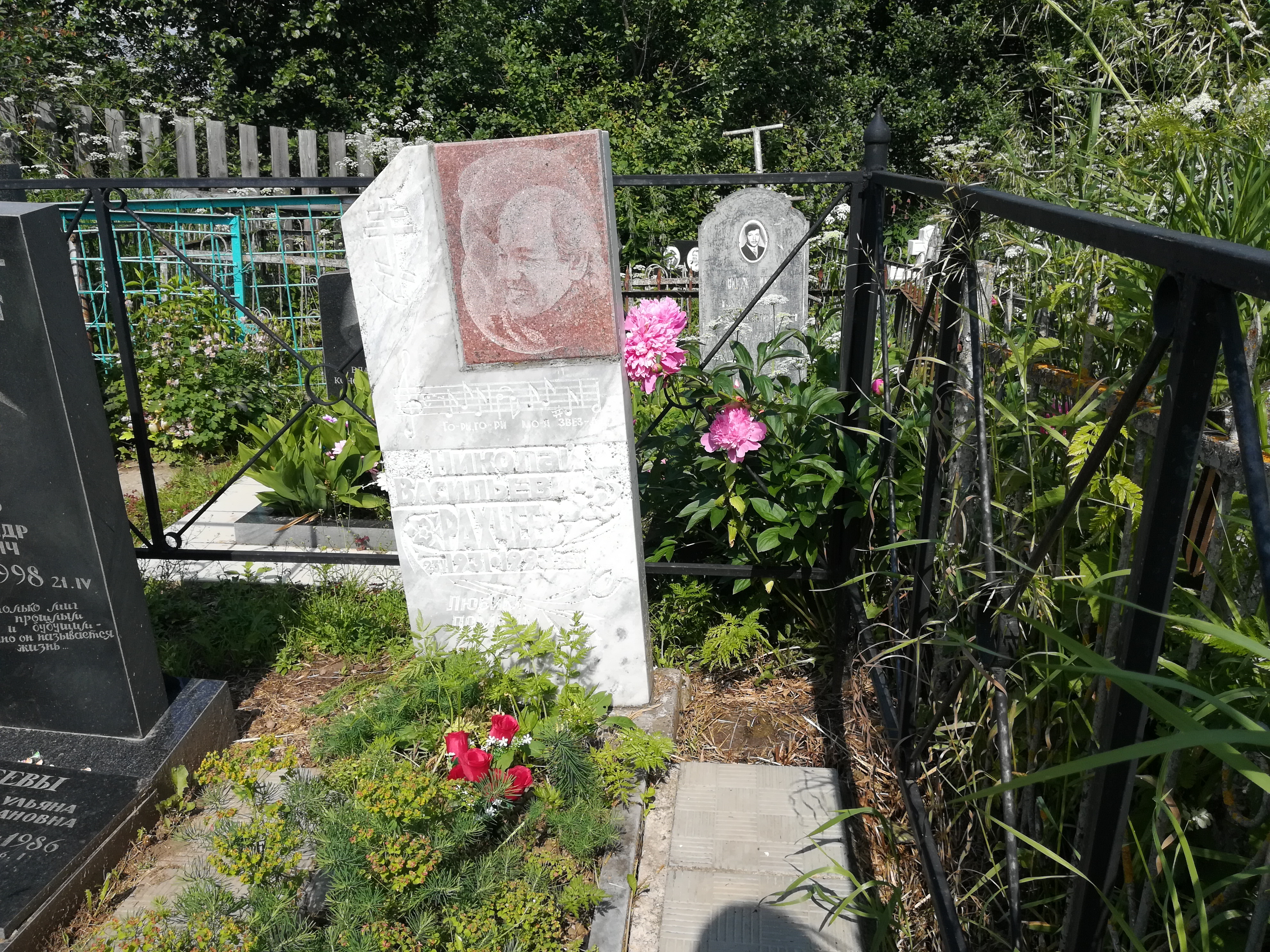 Боголюбово